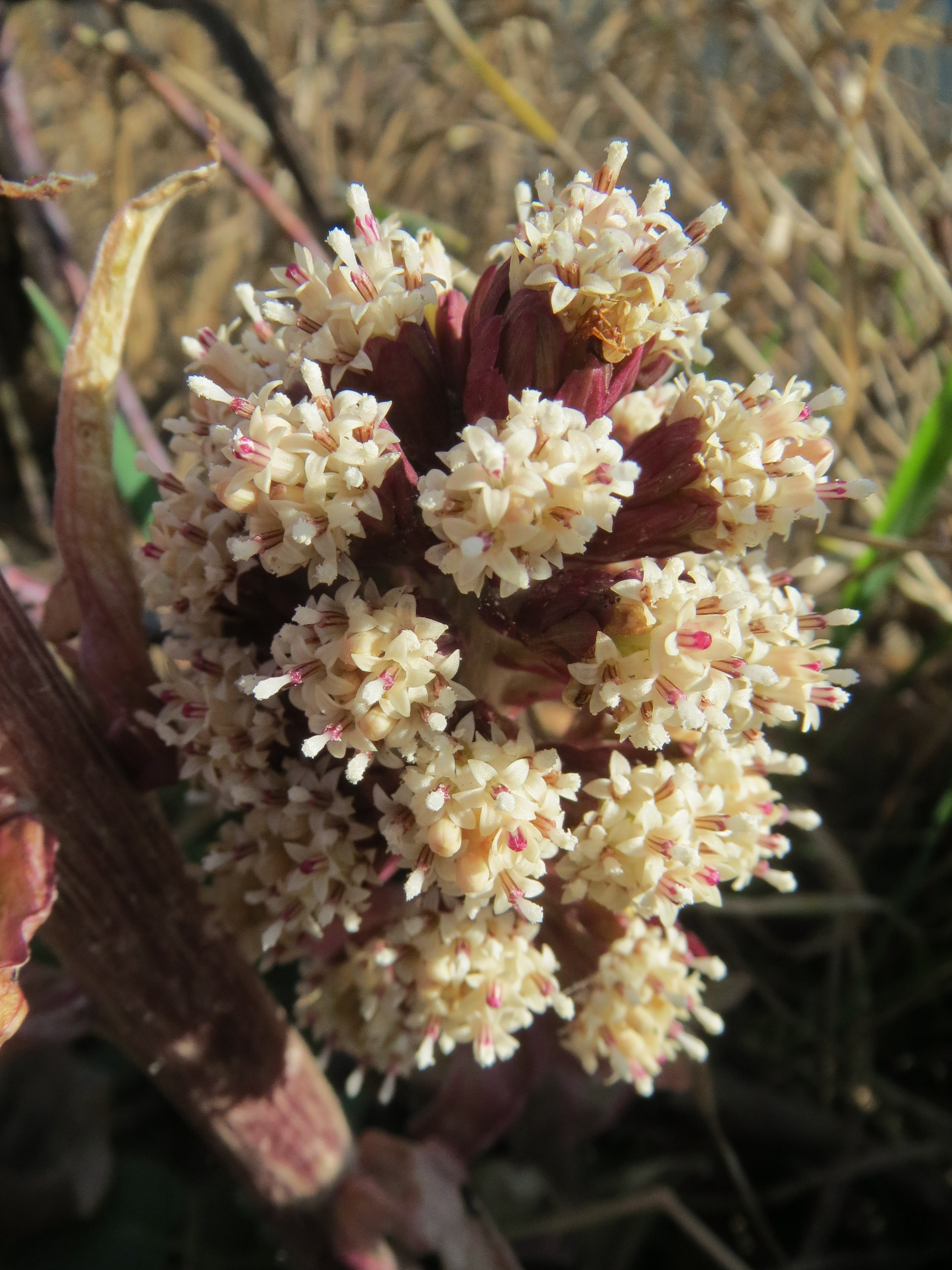 Gewöhnliche Pestwurz (Petasites hybridus) an der Saar in Saarbrücken